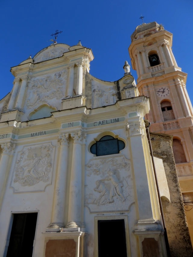 Chiesa di Santa Maria Assunta, Pompeiana, Liguria, Italia